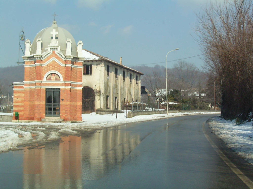 Il capitello di San Carlo, a Volpago del Montello, Treviso, Italia